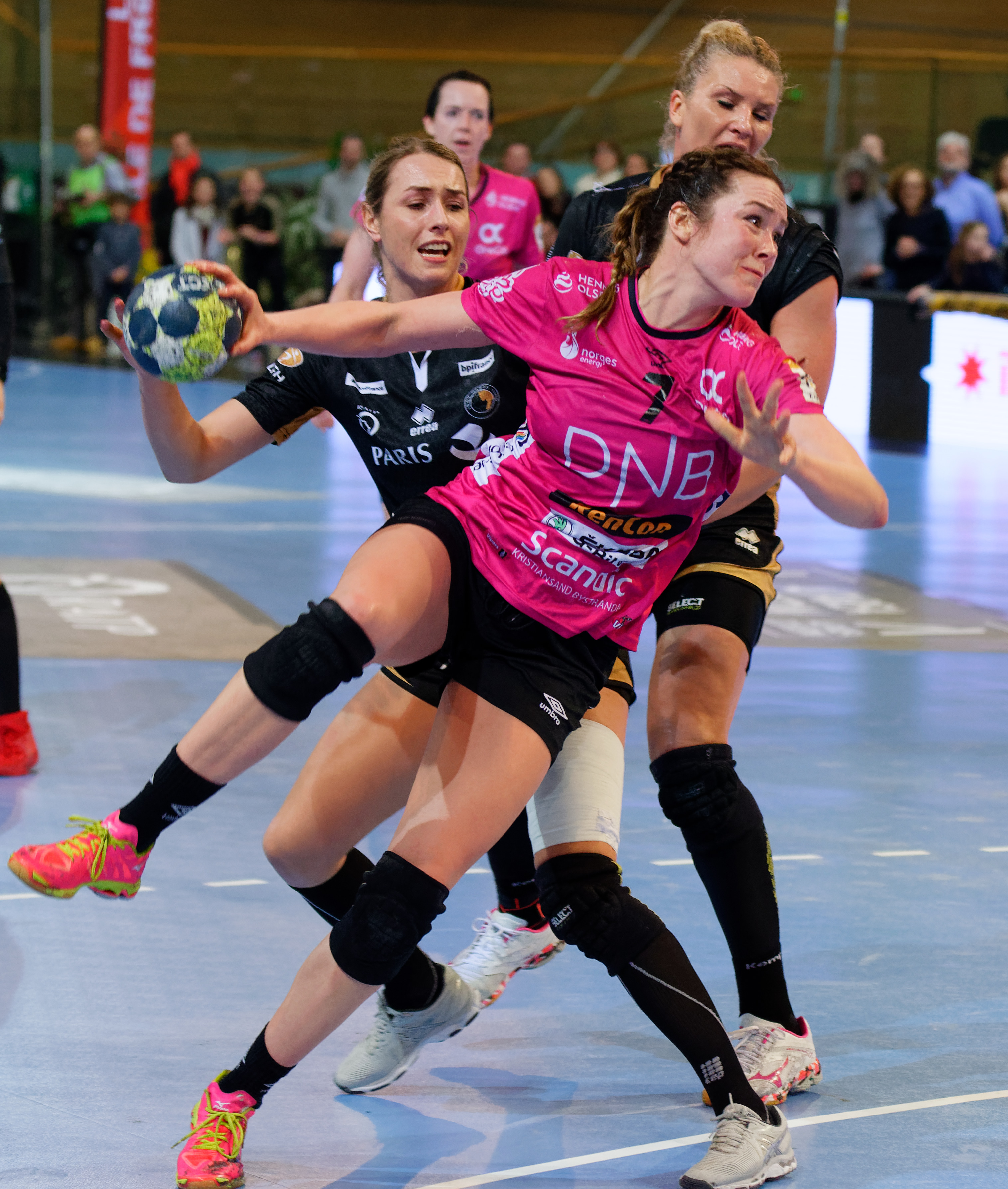 Rencontre du tour principal de coupe EHF entre Issy Paris Hand et les norvégiennes de Vipers Kristiansand au vélodrome de Saint-Quentin en Yvelines, le 03 février 2018.